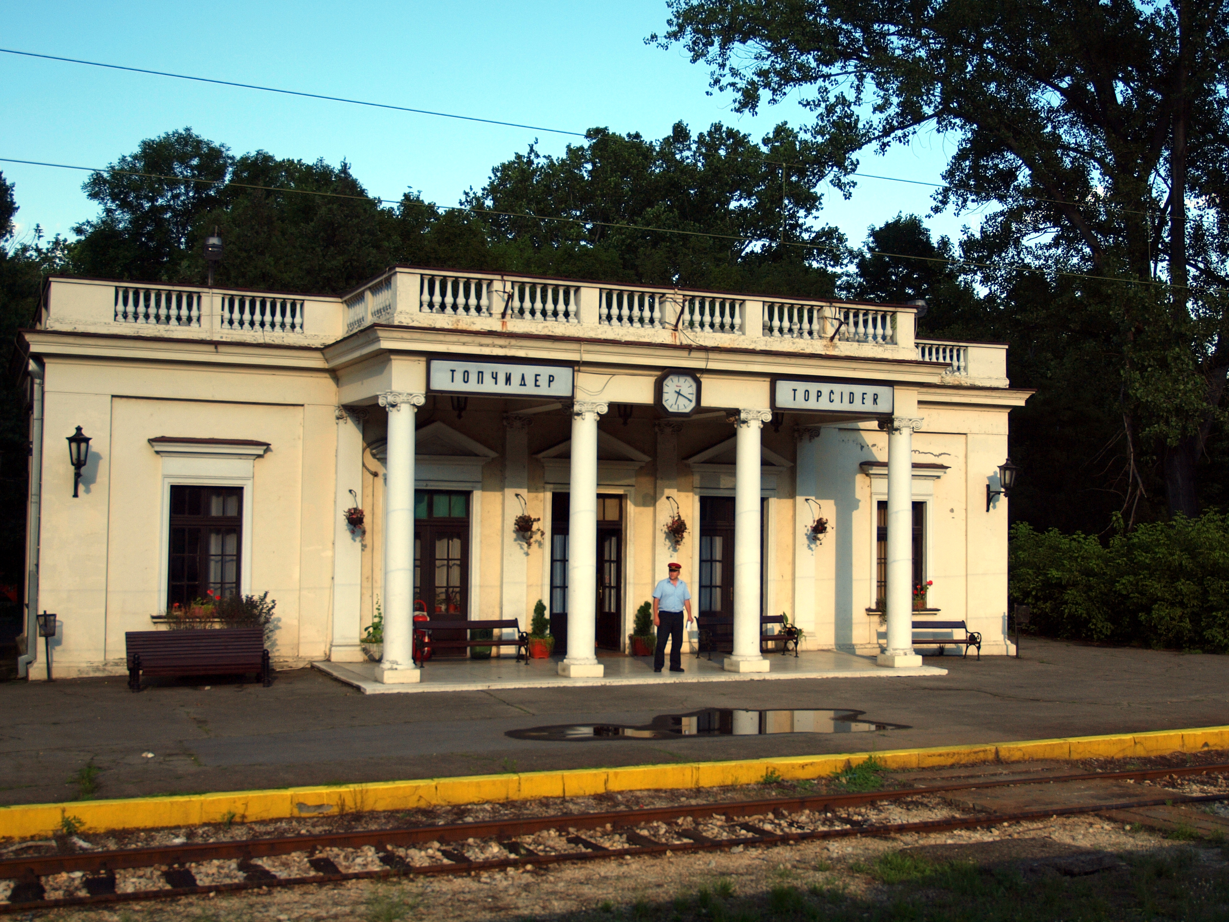 Topčider railway station in Belgrade